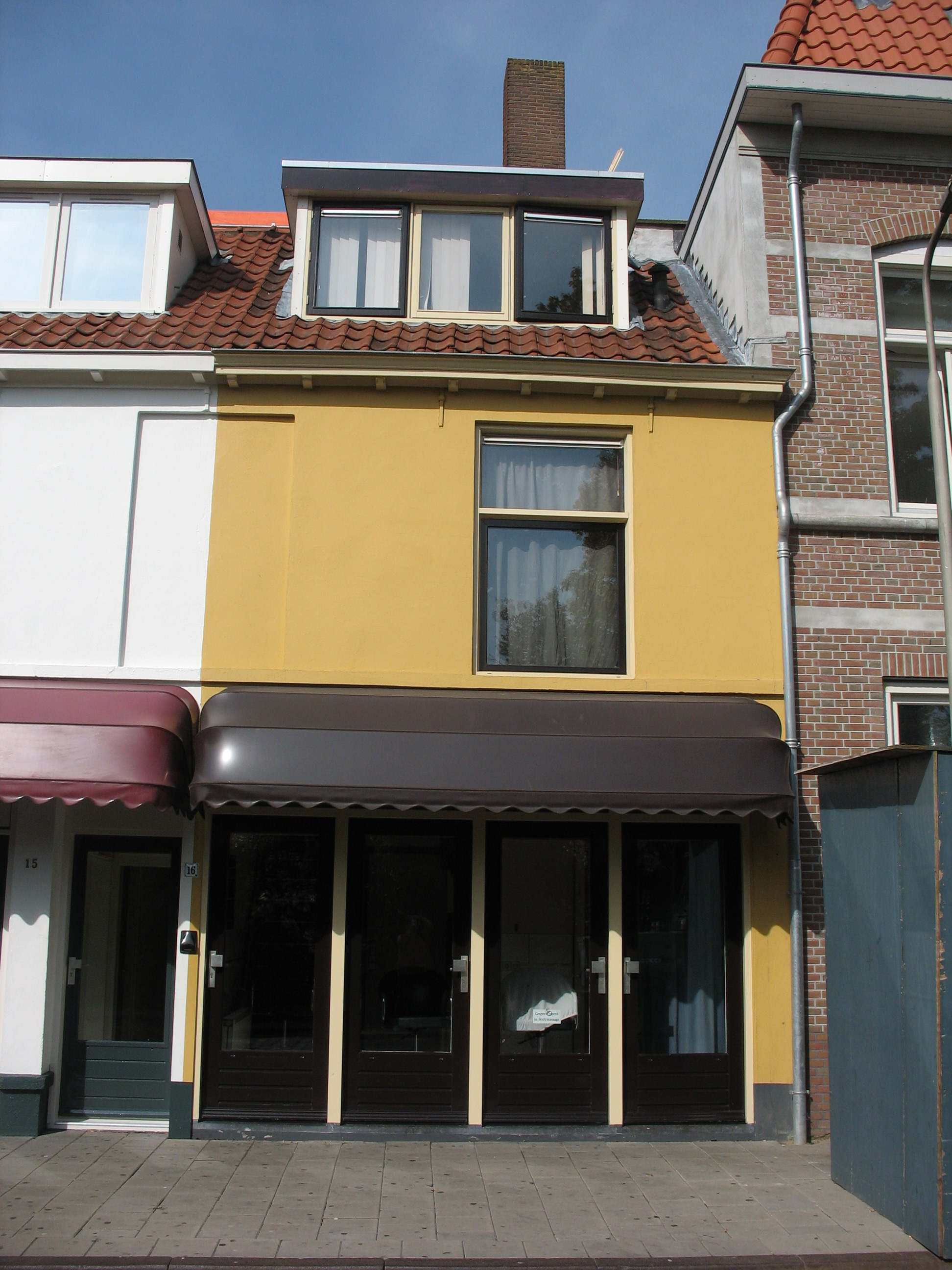 Bokkingshang 16 - Deventer